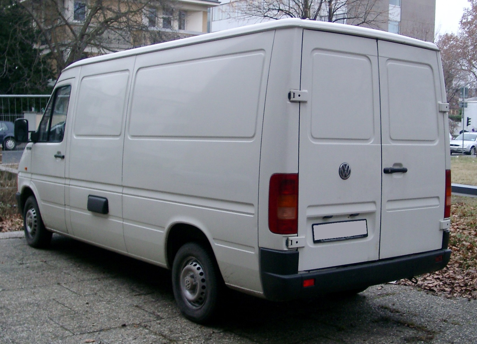 VW LT 28